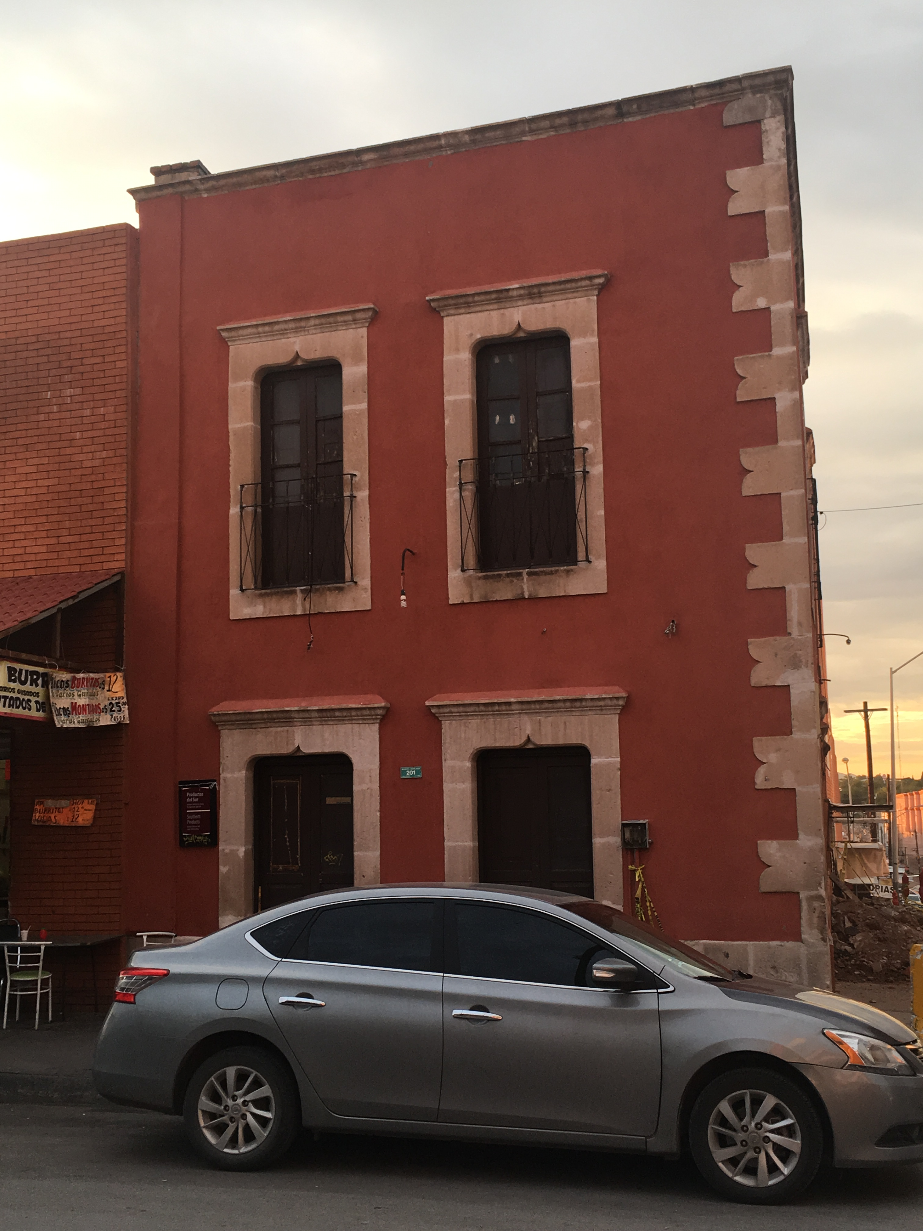 Casa del Sur en Chihuahua, dañada por las lluvias en septiembre de 2018